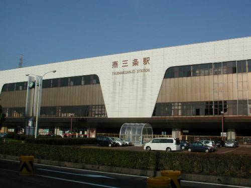 JR燕三条駅・燕口